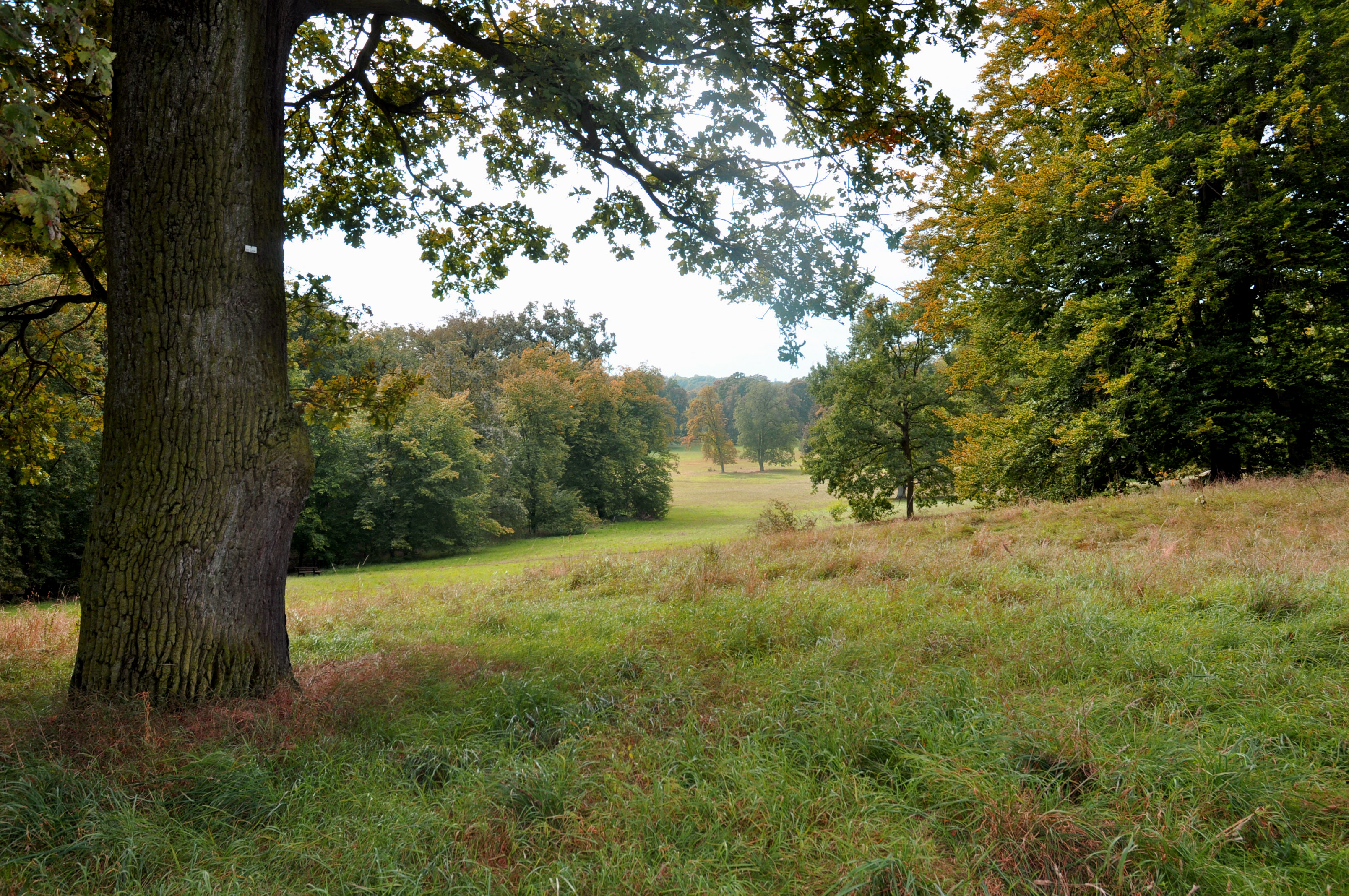 Großer Wiesengrund im Park Klein-Glienicke von Norden